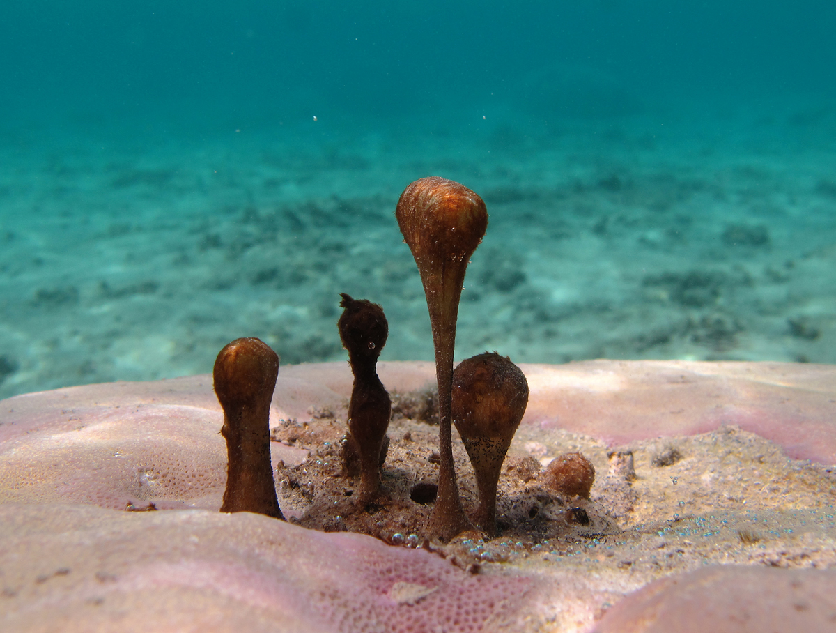 Une colonie de Cyanophyceae du genre Hydrocoleum à la Réunion.